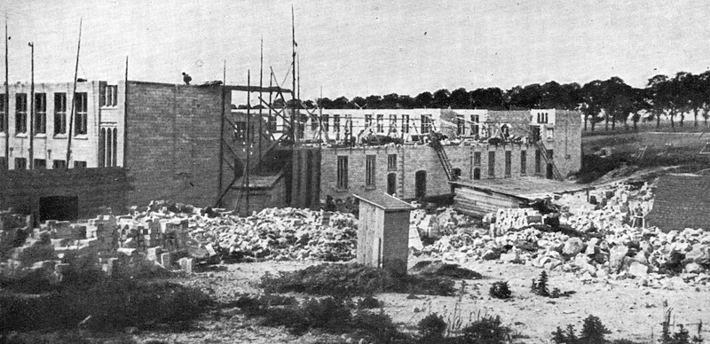 Bouw van het Voogdijgesticht St. Joseph te Cadier en Keer van 1911 tot 1913.